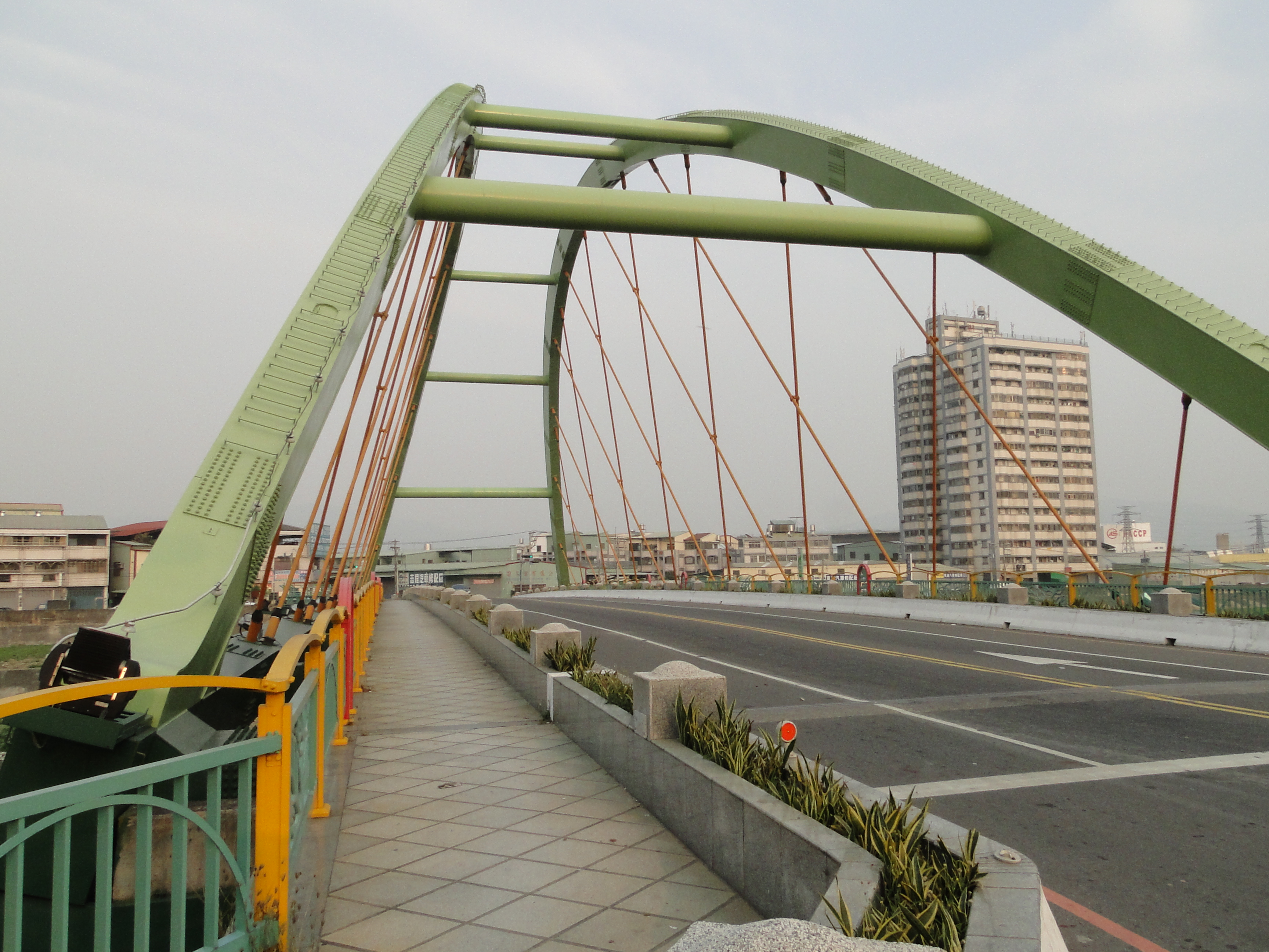 中文（台灣）: 台灣台中市東昇橋一景（2010/2/28）